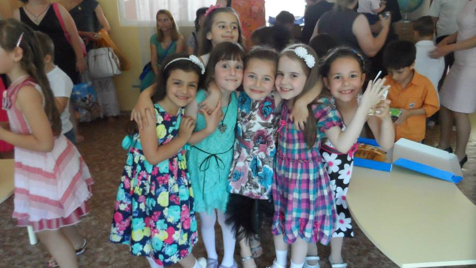 ОДЗ Здравец - завършване